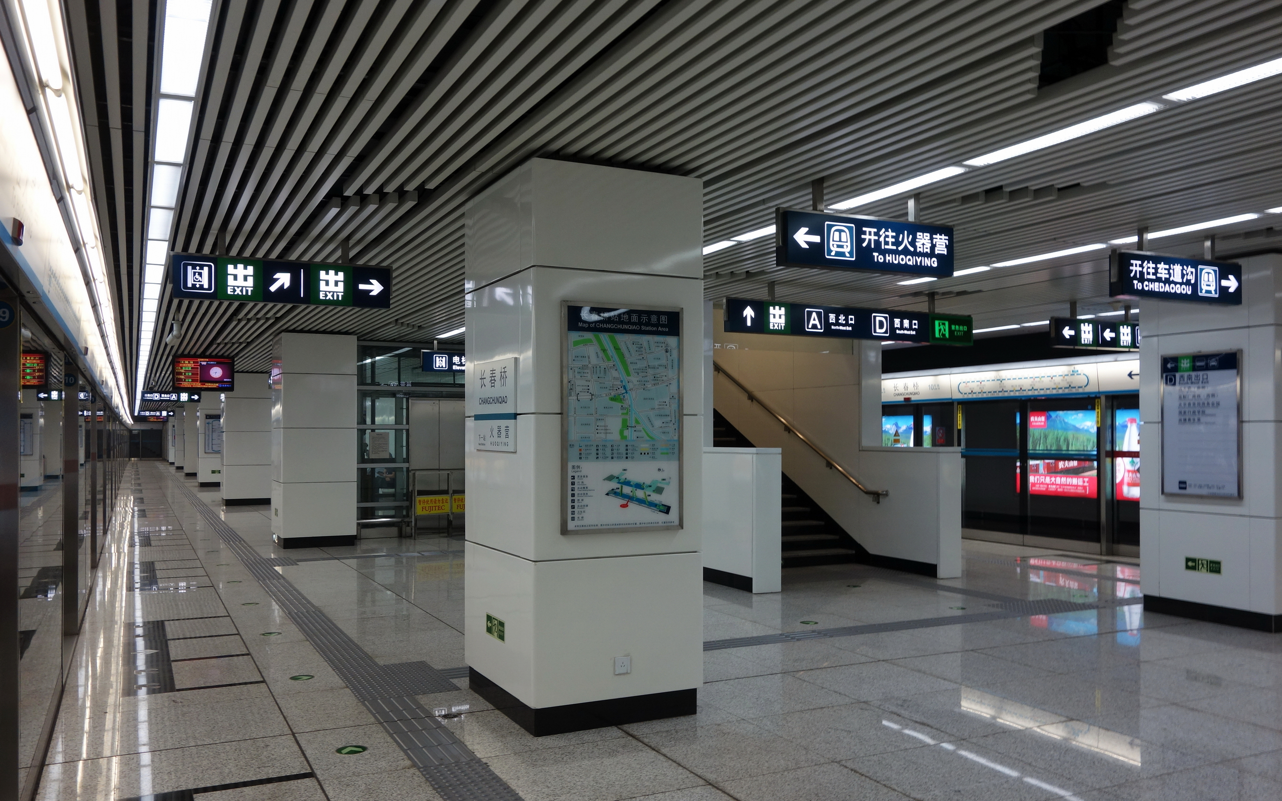 北京地铁10号线长春桥站站台